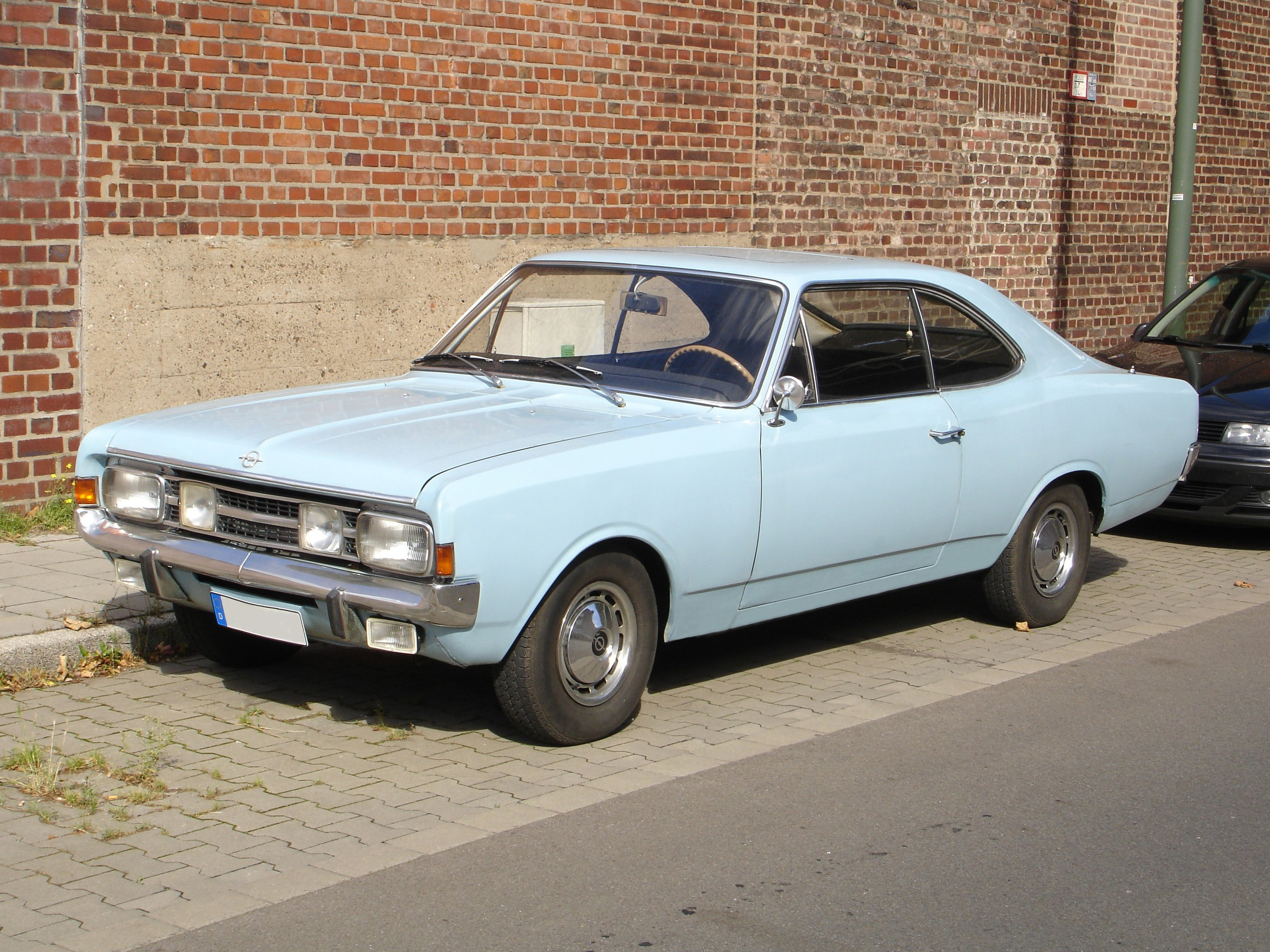 Opel Rekord C Coupé